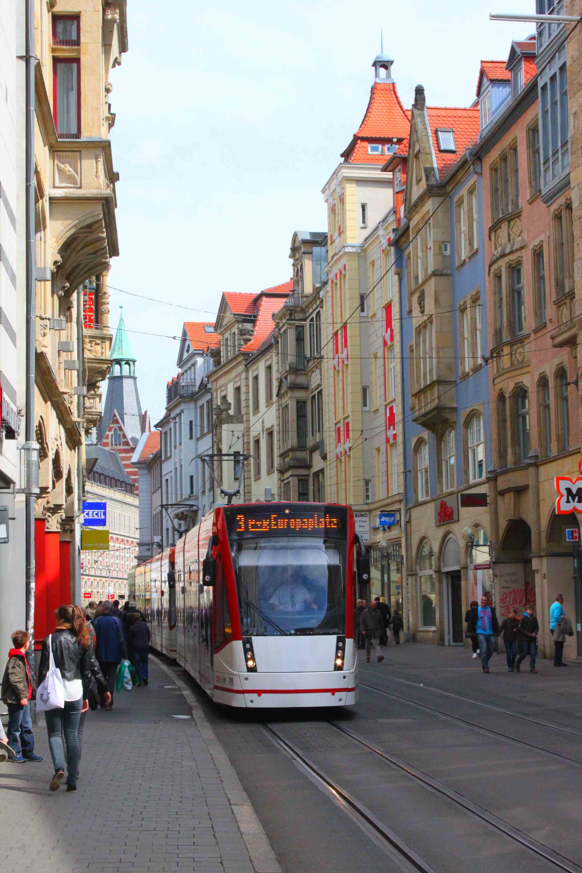 Straßenbahn in der Schlösserstraße